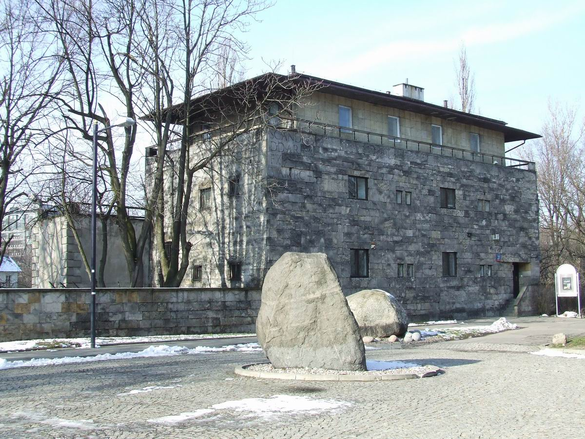 Willa Pniewskiego, Muzeum Ziemi PAN, Warszawa